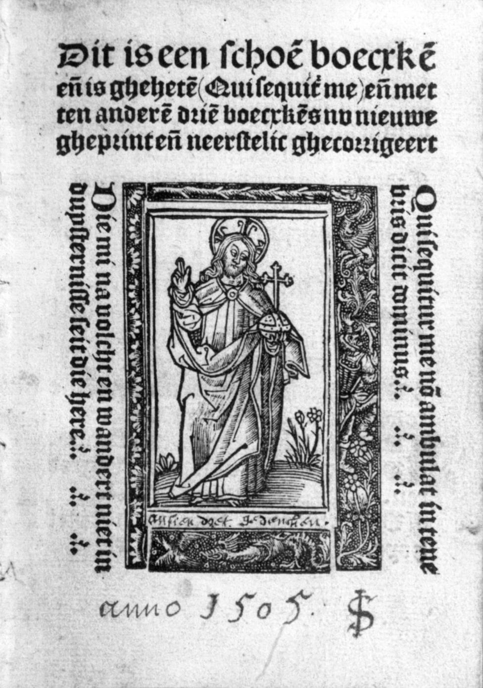 Thomas van Kempen, De navolging van Christus, titelpagina. Antwerpen, 1505. Houtsnede. Utrecht, Museum Catharijneconvent.